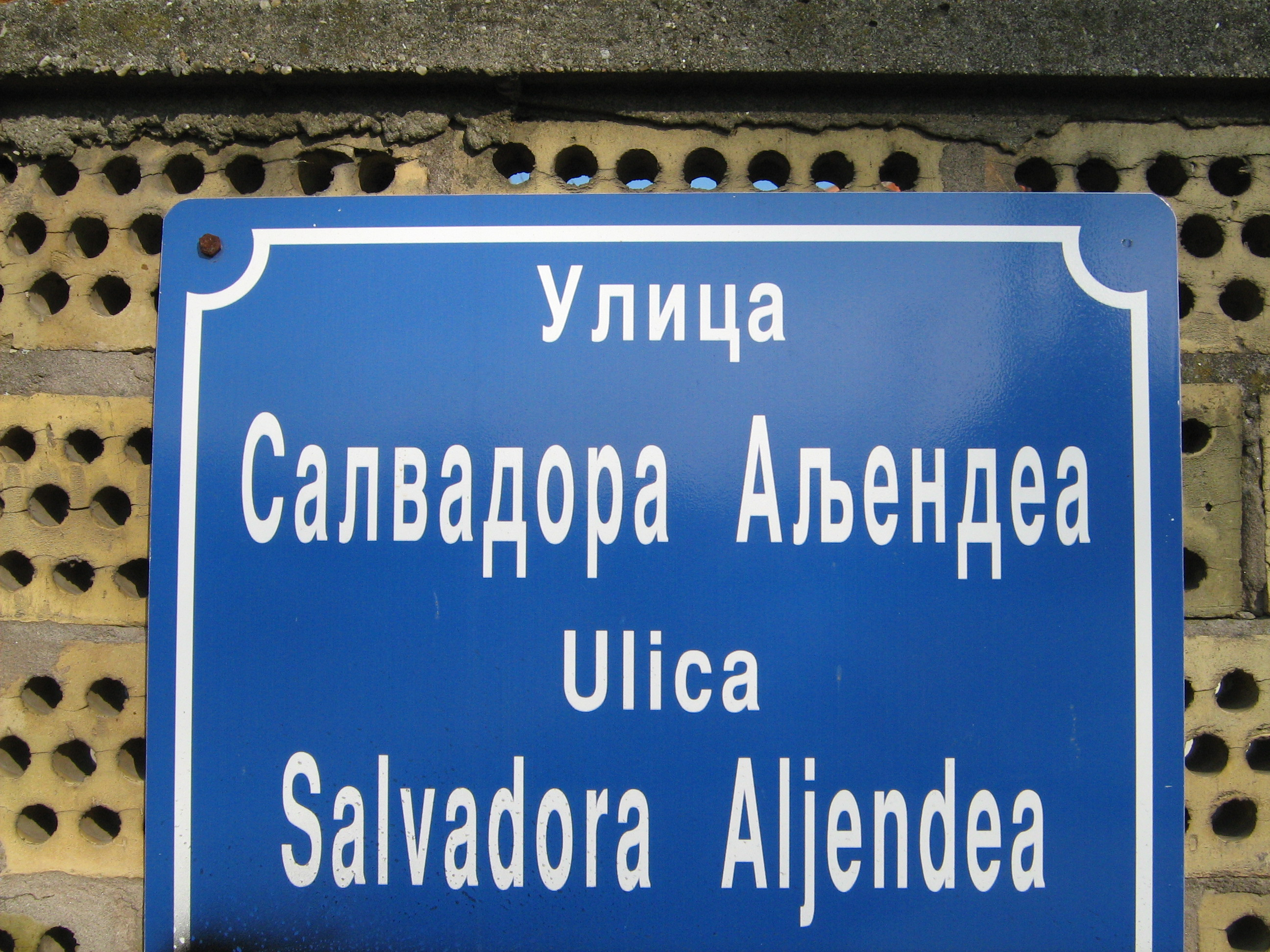 JA SAM AUTOR